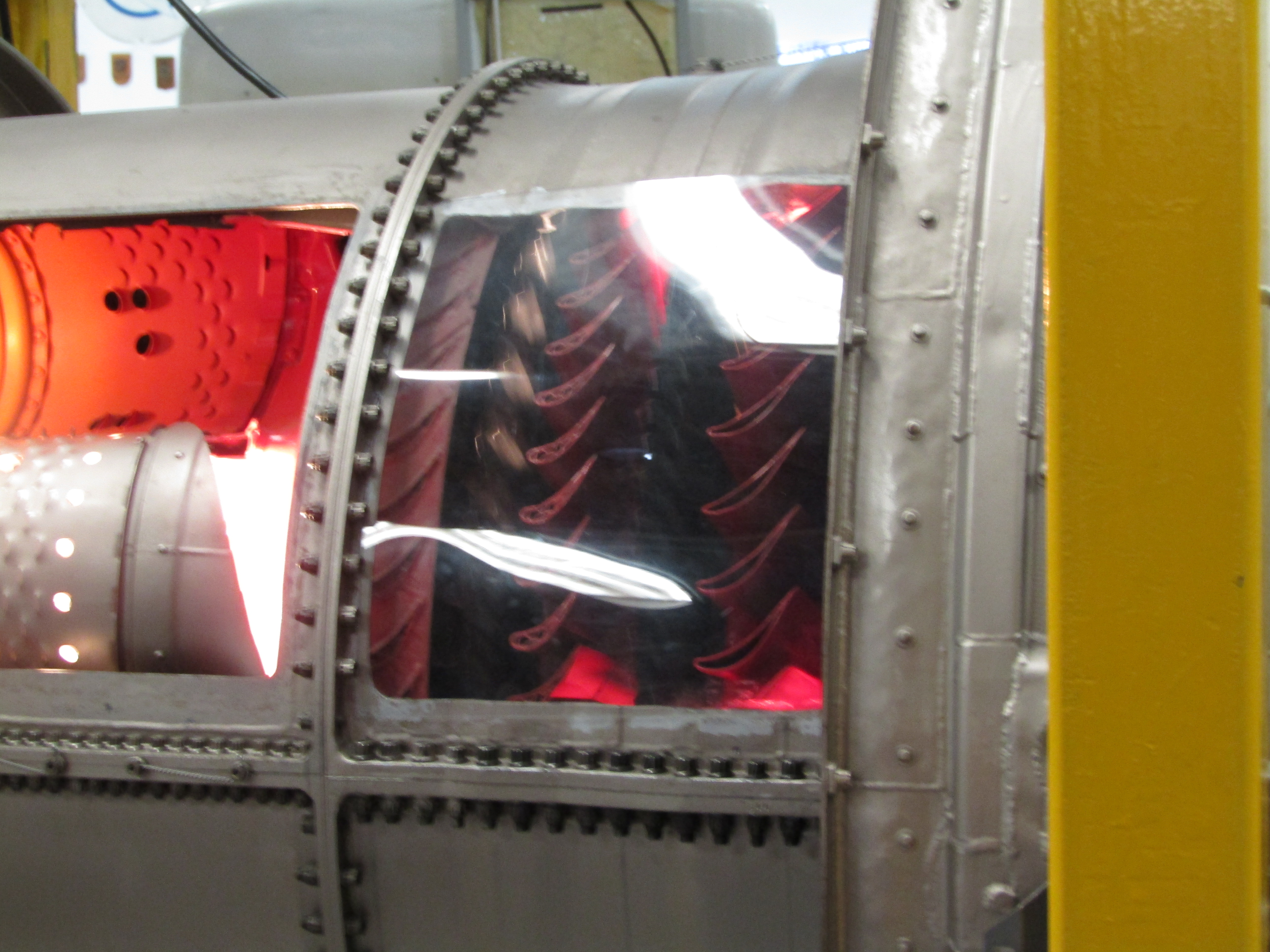 Se muestra la disposición de los alabes de rotor y estátor en una turbina axial dentro de un turbofan de exposición.